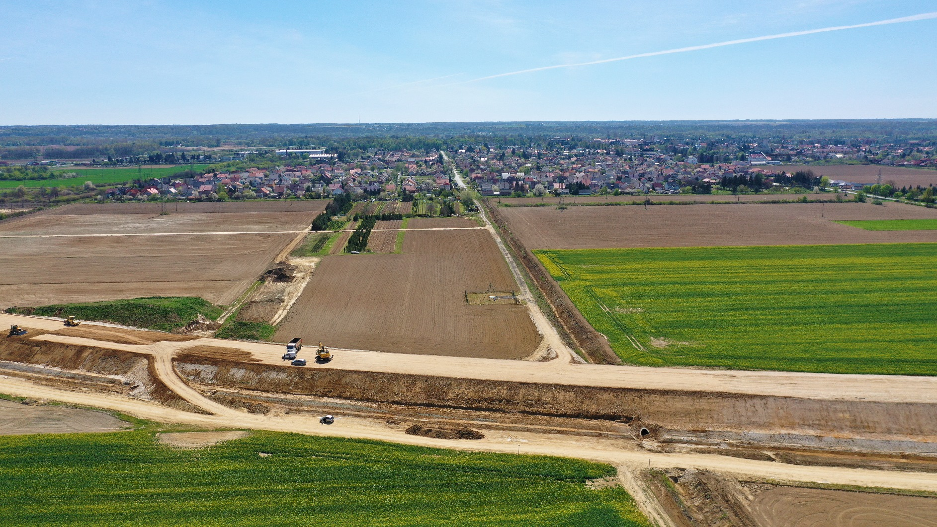 Légifelvétel az M8 épülő szakaszáról